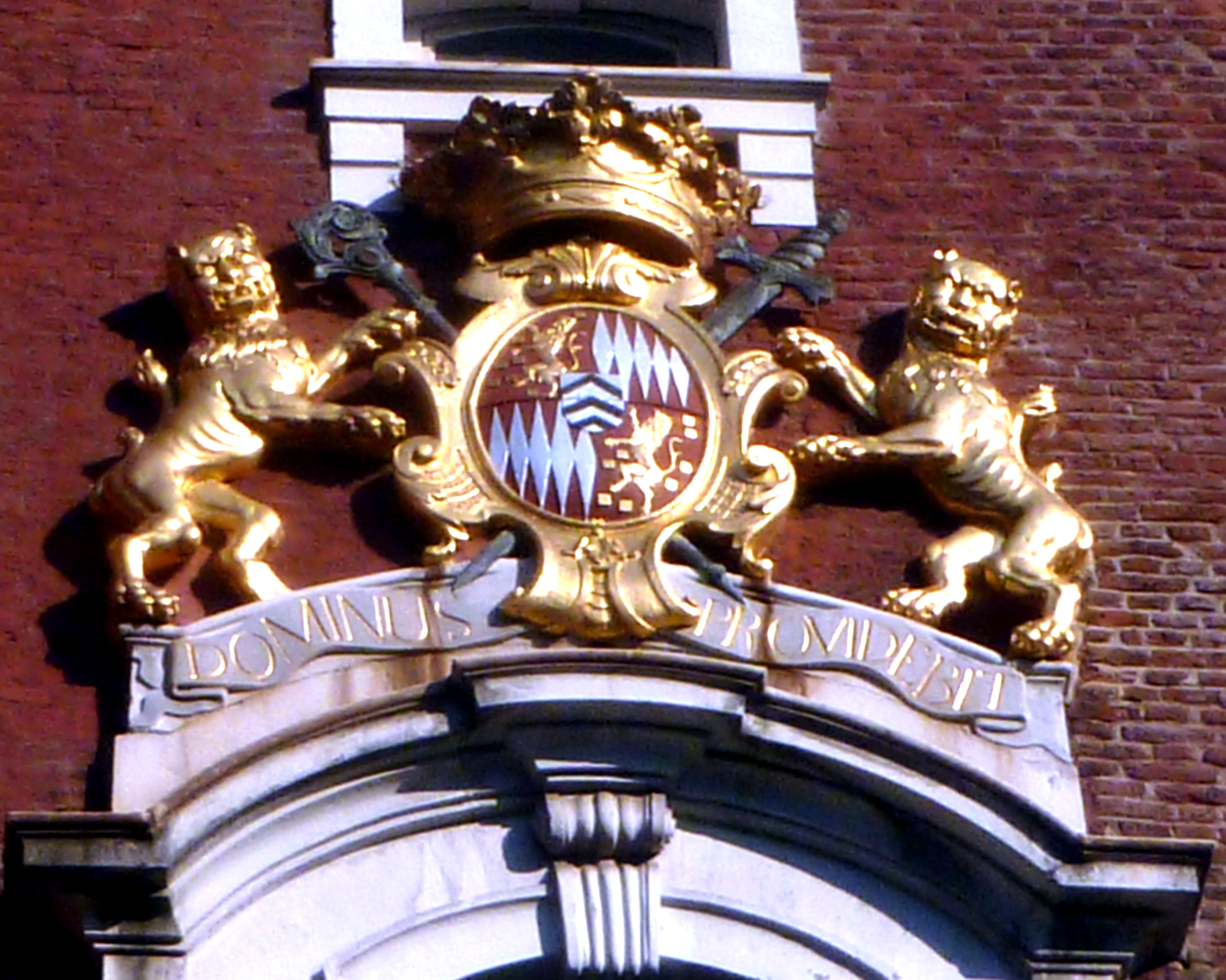 Wappen der Äbtissin Anna Carolina Margarethe van Renesse van Elderen an der Nordseite des Turmes von St. Johann Aachen-Burtscheid